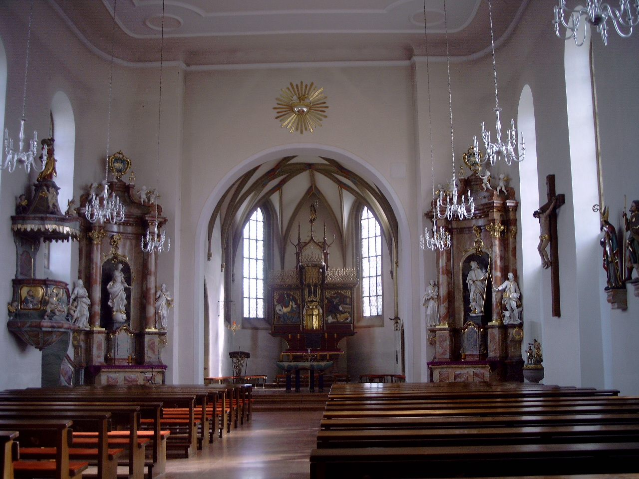 St. Lambertus Mingolsheim, Innenansicht